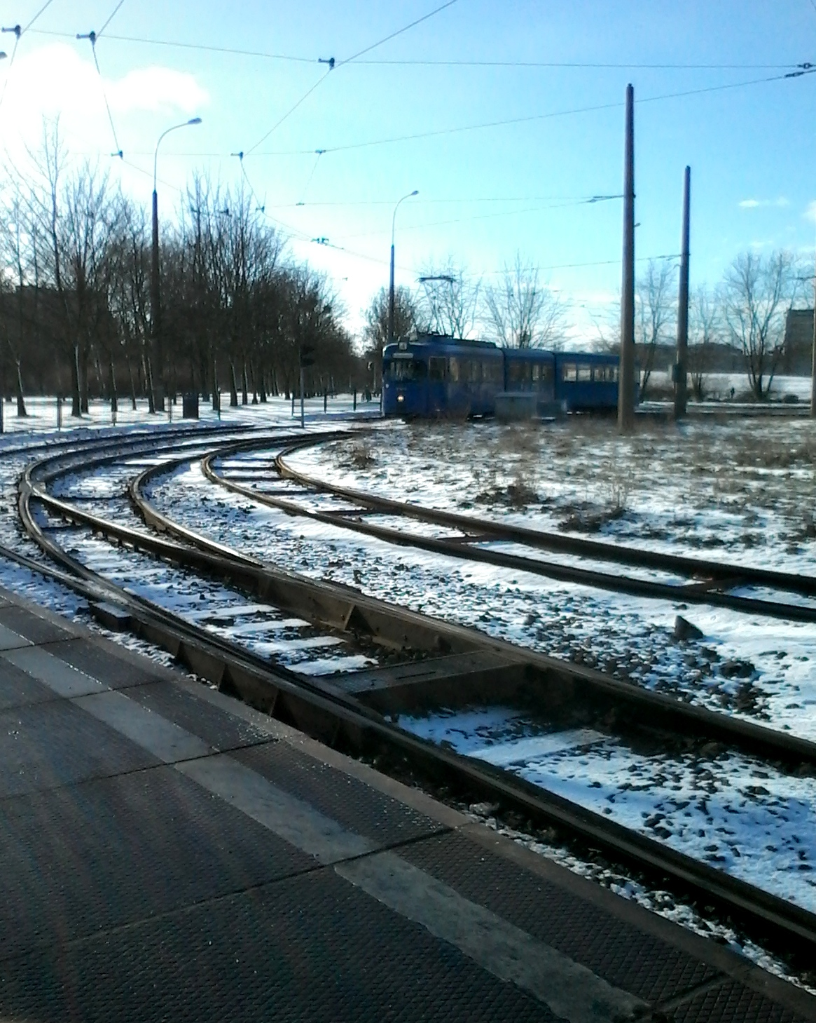 Połabska